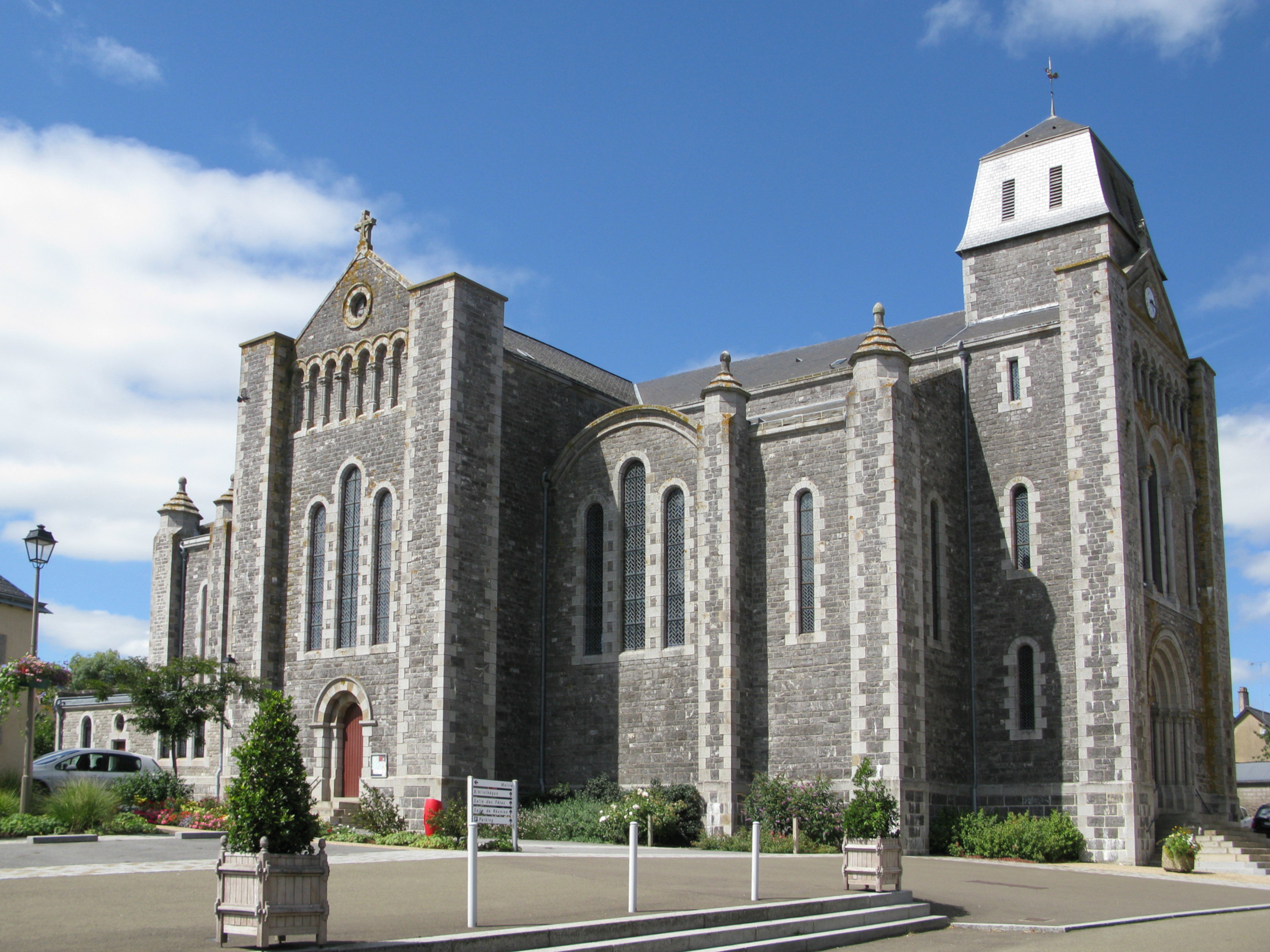 Église de Saint-Ouën-des-Toits